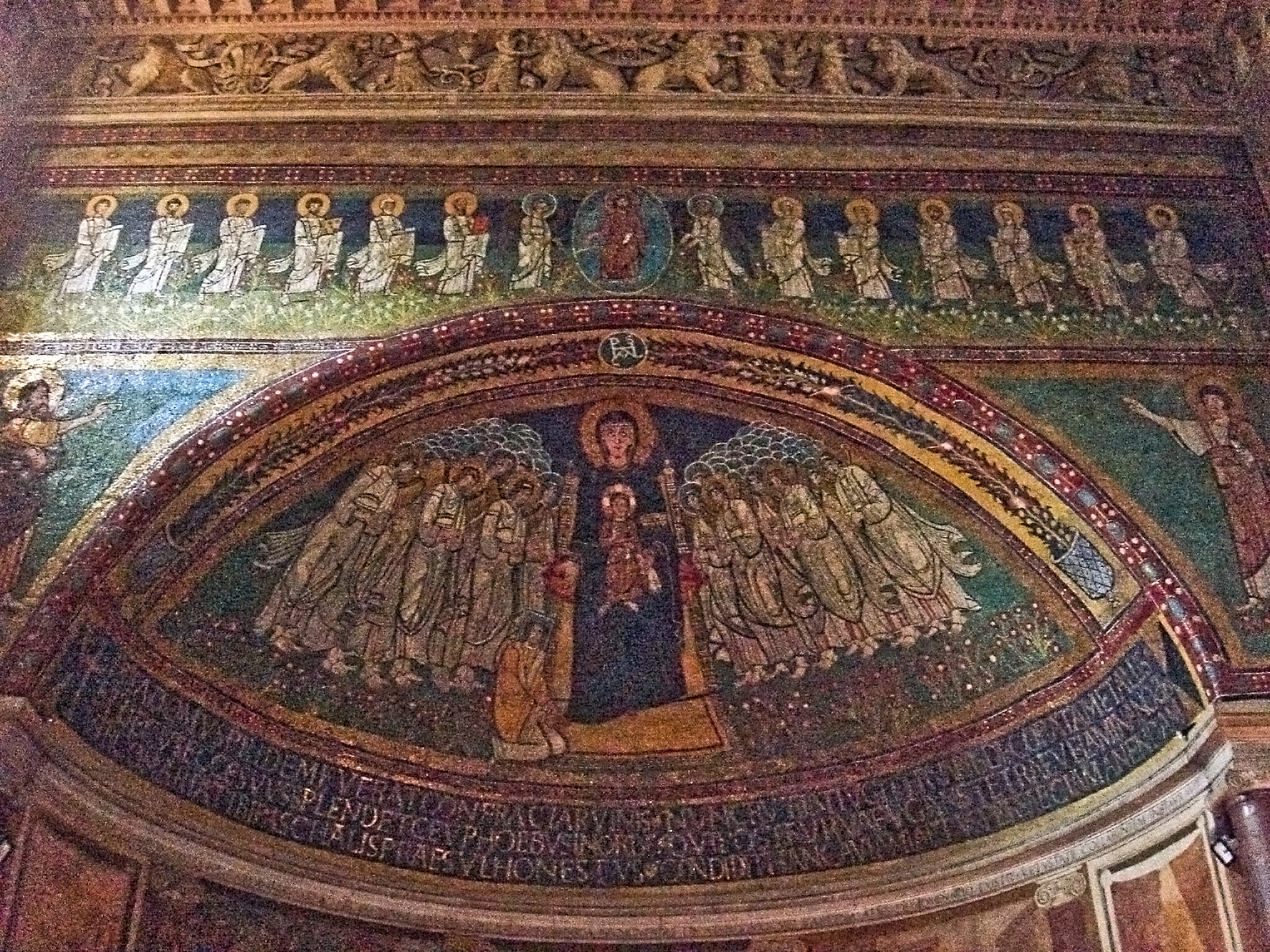 Roma, Santa Maria in Domnica: Mosaico dell'abside